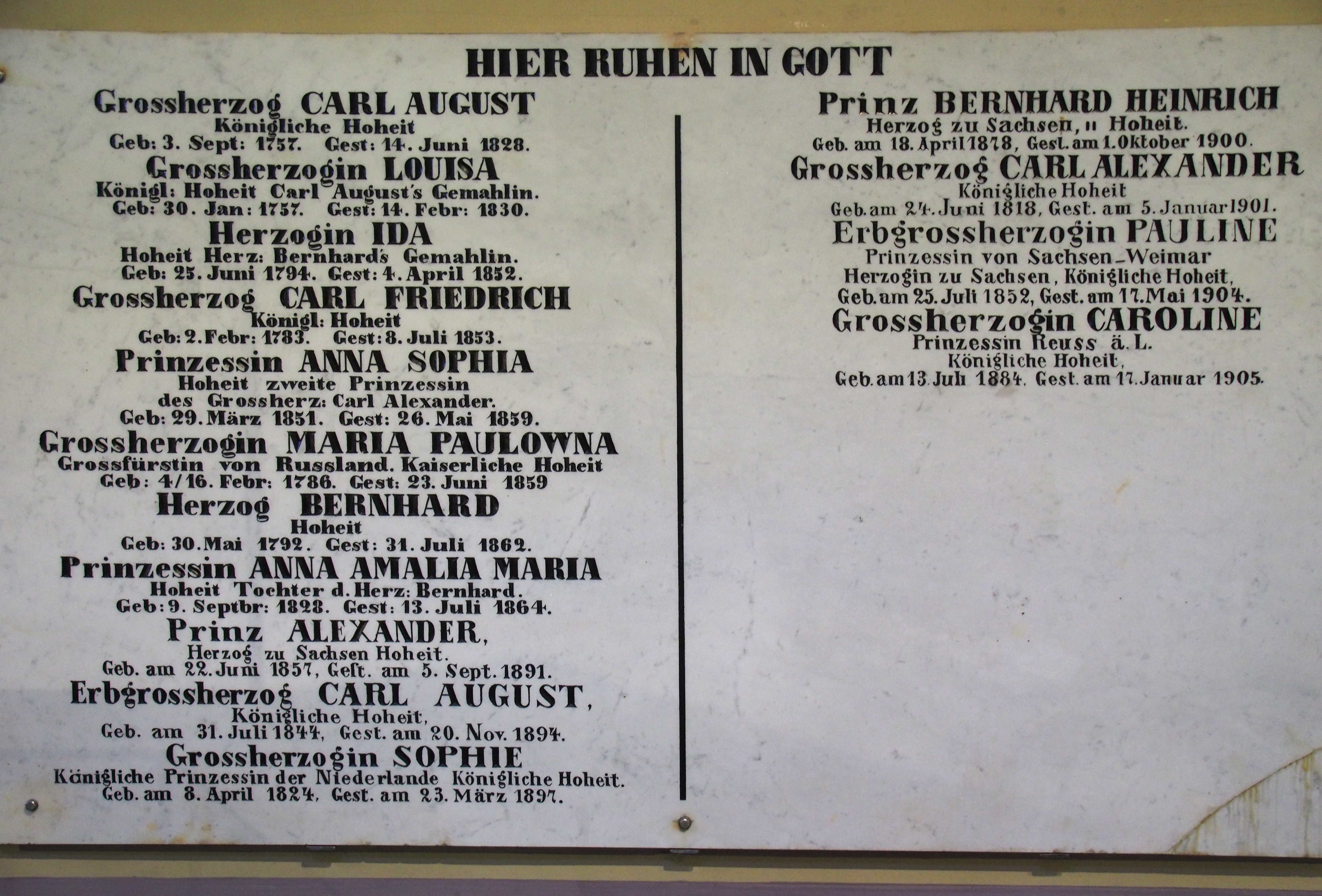 Verzeichnis der Särge in der Fürstengruft auf dem Historischen Friedhof (Weimar)